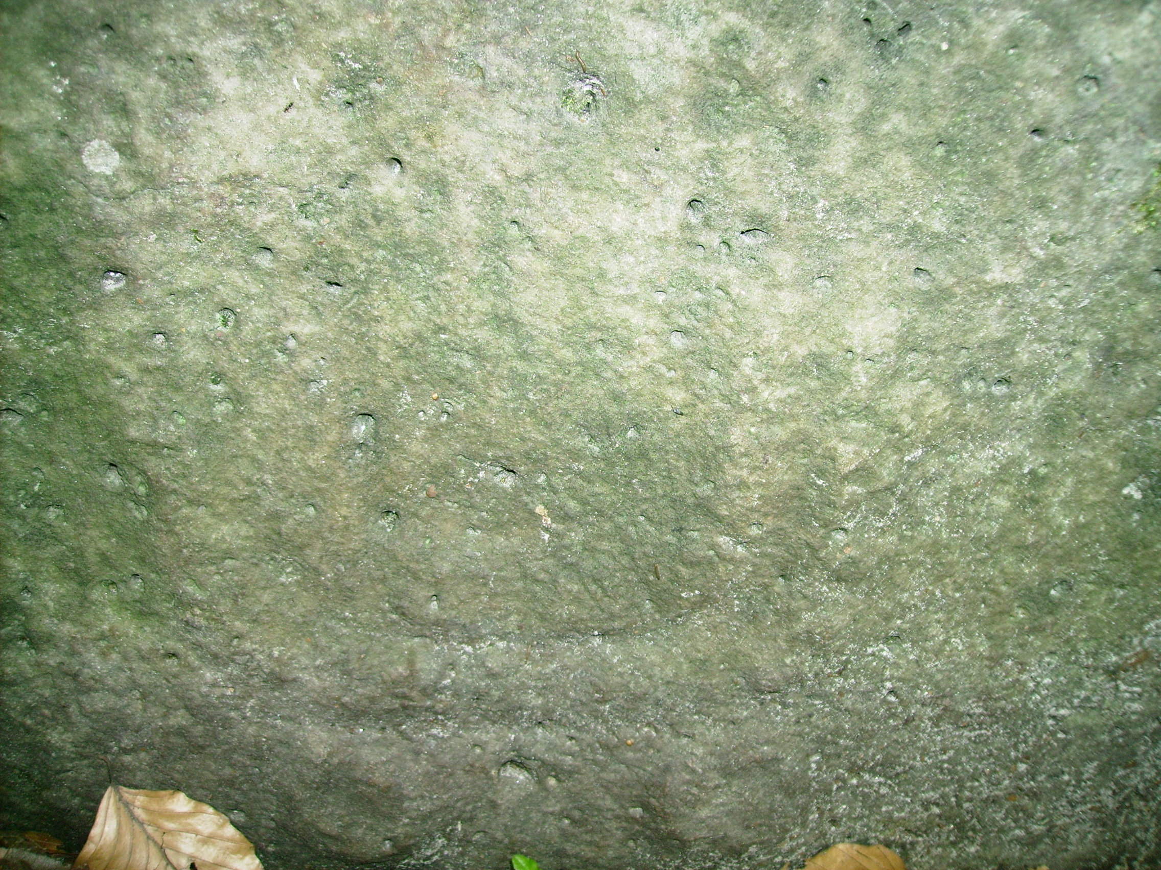 Gravure dans l'allée couverte de la Pierre Turquaise à Saint Martin du Tertre